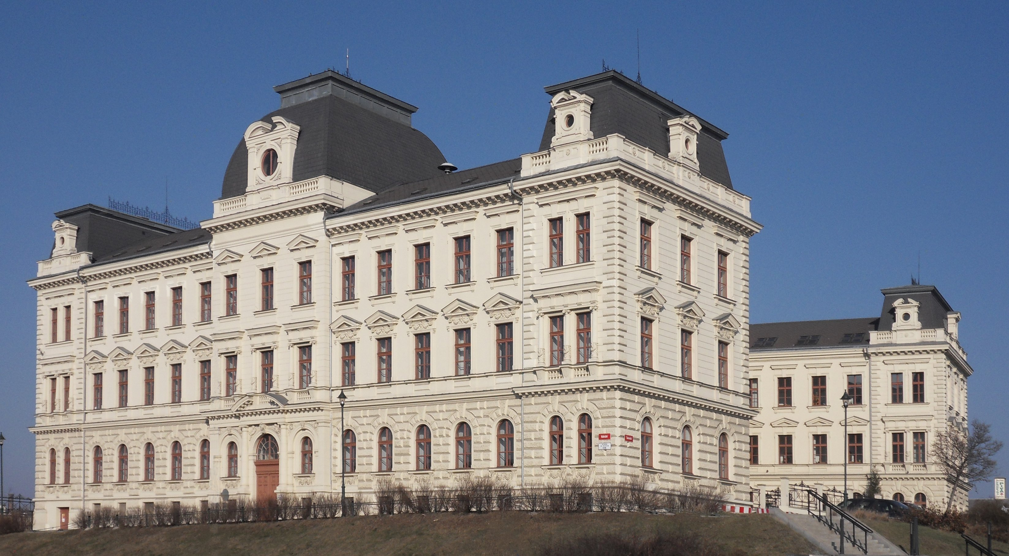 Budova okresního soudu Plzeň-město